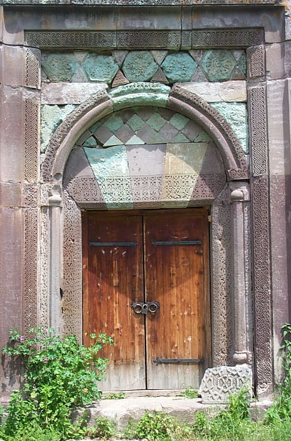 Makaravank Monastery in Armenia.